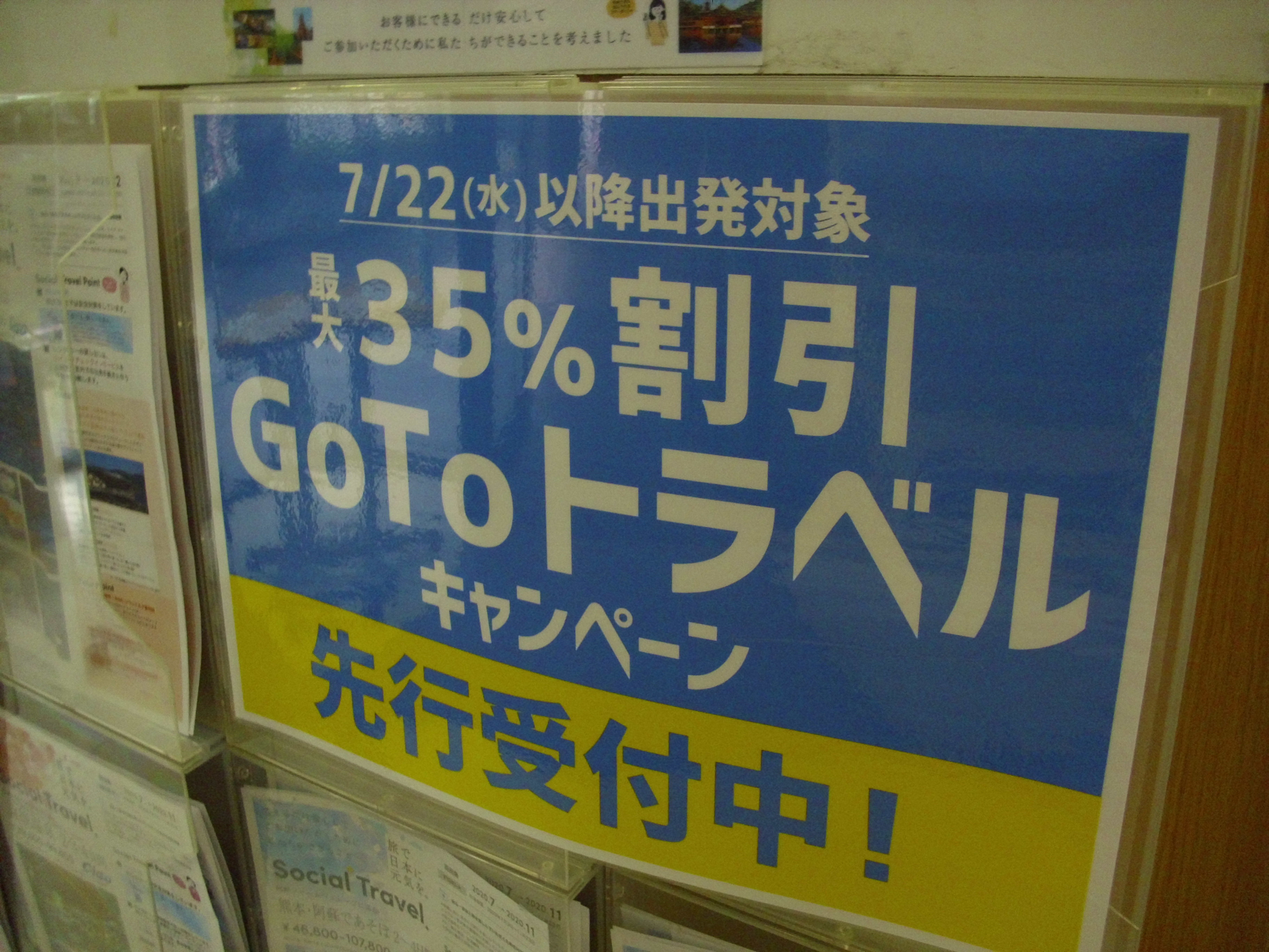 2020年7月22日から始まるアフターコロナ景気対策のGo toキャンペーンの先行受付を開始した旅行会社のH.I.S.